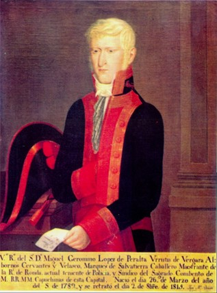 Fotografía publicada en la Revista Artes de México (primera época), número 132 “Reseña del Retrato Mexicano, pág. 30, imagen No. 15, año XVII, 1970, México.